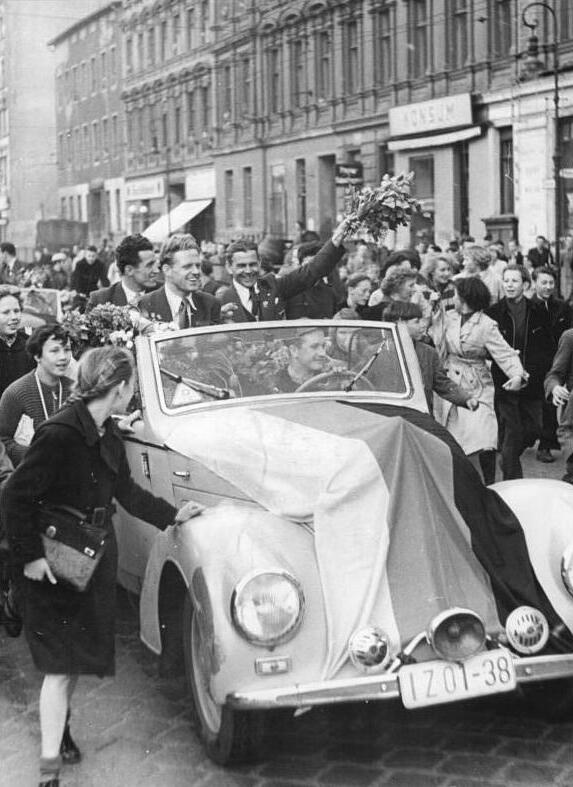 Berlin, Empfang für Radrennfahrer Zentralbild Funck Bey-Ho 21.5.1955 - DDR-Friedensfahrer wurden in Berlin empfangen. Eine grosse Menschenmenge hatte sich am Sonnabend früh, dem 21.5.1955, am Ostbahnhof eingefunden, um unseren aus Warschau zurückkehrenden Friedensfahrern einen würdigen Empfang zu bereiten. UBz: Meister II, Schur und Delegationsleiter Scharch (von links nach rechts) bei der Fahrt durch die Fruchtstrasse.